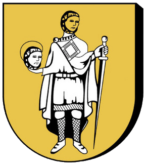 Das Gemeindewappen Matreis wurde bereits 1691 durch den Salzburger Dompropst verliehen. Dargestellt wird auf gelbem Grund ein Märtyrer, der in seiner linken Hand ein Schwert, in der rechten seinen abgeschlagenen Kopf hält. Fälschlicherweise wird auf dem Gemeindewappen jedoch Alban von England (erkenntlich an seiner römischen Soldatenbekleidung) und nicht Alban von Mainz dargestellt. Alban von Mainz ist der tatsächliche Namenspatron der Pfarrkirche. Auf Bestreben der Gemeinde zeigt das Wappen heutzutage einen zusätzlichen Kopf auf dem Rumpf Albans, um nicht mehr als "Kopflose" verspottet zu werden.